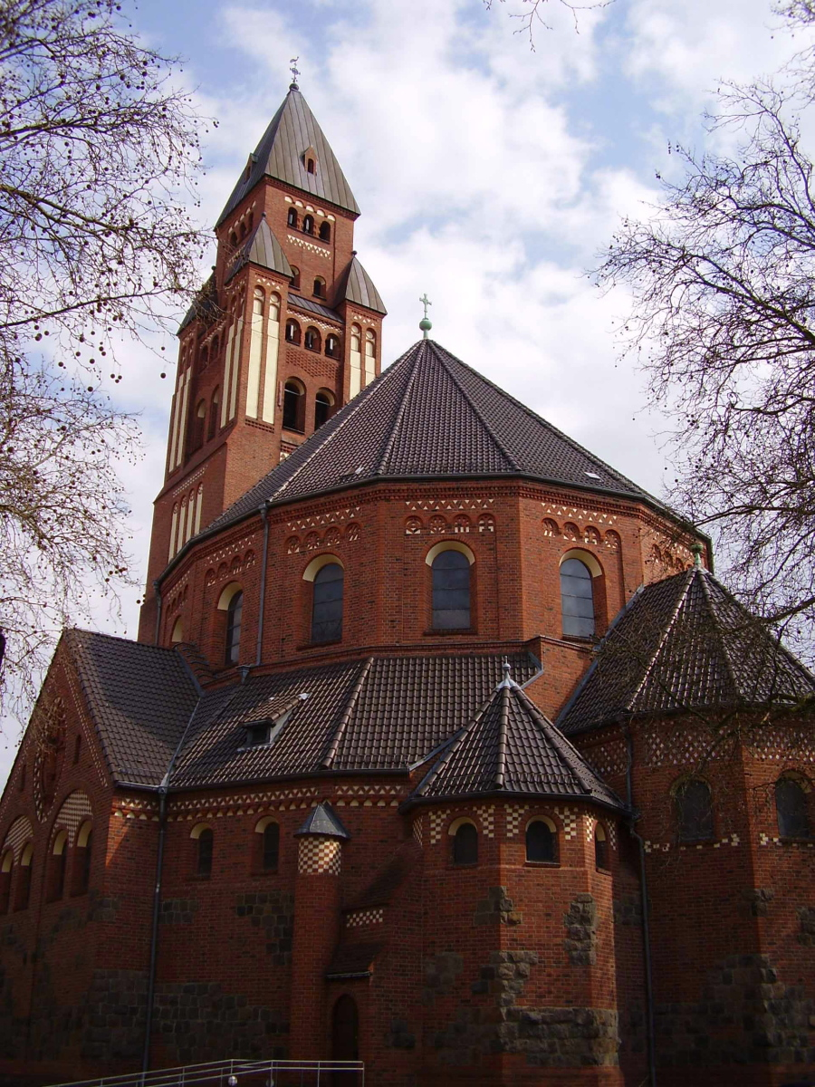 Kirche St. Marien - Unbeflekte Empfängnis - in Berlin Friedenau/Wilmersdorf, Bergheimer Platz